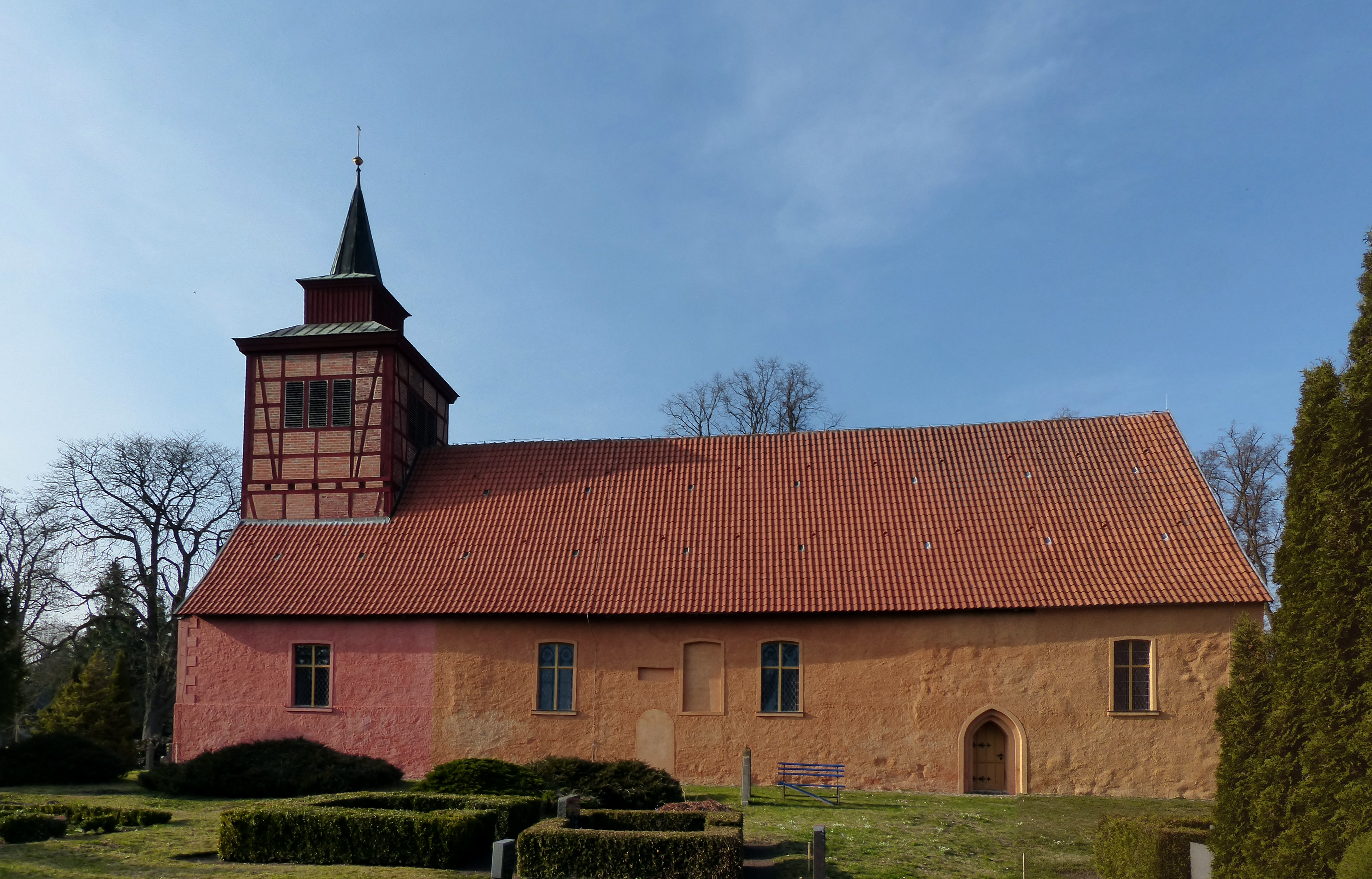 Kirche Kagendorf, Ansicht von Süden